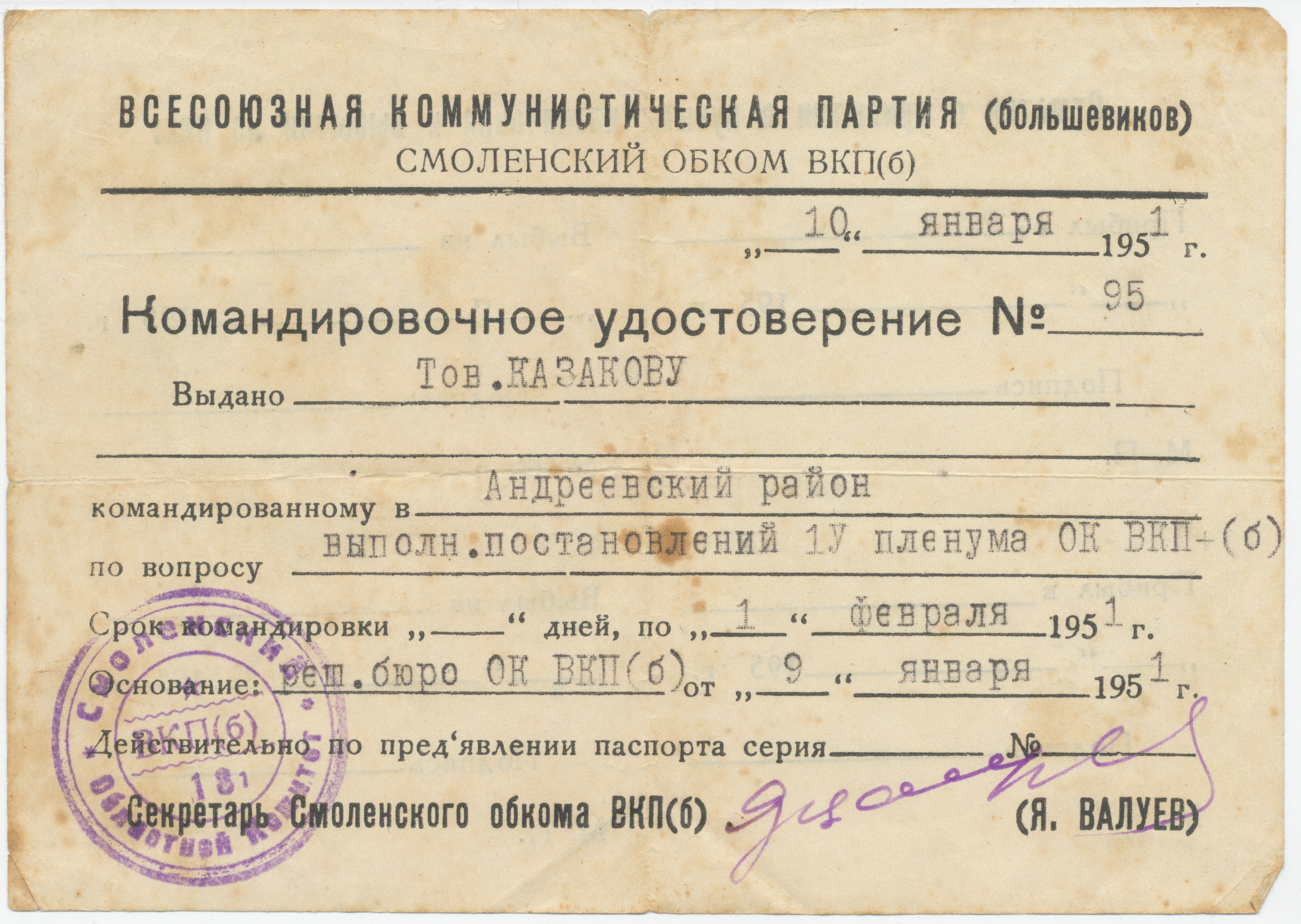 Командировочное удостоверение № 95 Выдано тов. Казакову [Михаилу Александровичу], командированному в Андреевский район по вопросу выполнения постановлений IV пленума ОК ВКП(б) [Смоленского обкома]. Срок командировки - по 1 февраля 1951 г. Основание: решение бюро ОК ВКП(б) от 9 января 1951 г. Секретарь Смоленского обкома ВКП(б) - Я. Валуев